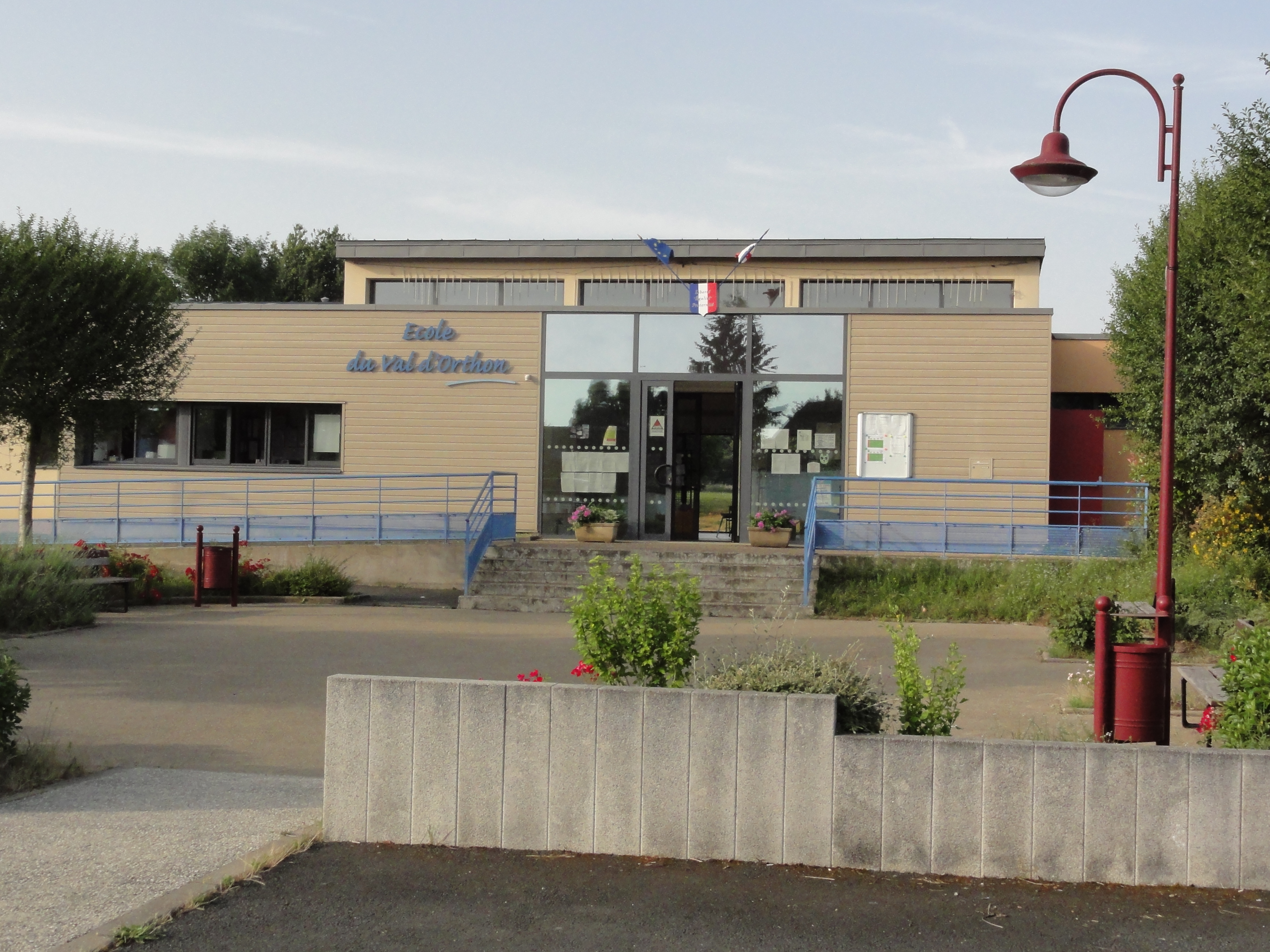 Maresché (Sarthe) école du Val-d'Orthon